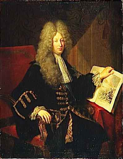 Fils de Louis Phélypeaux. Secrétaire d'Etat de la Marine